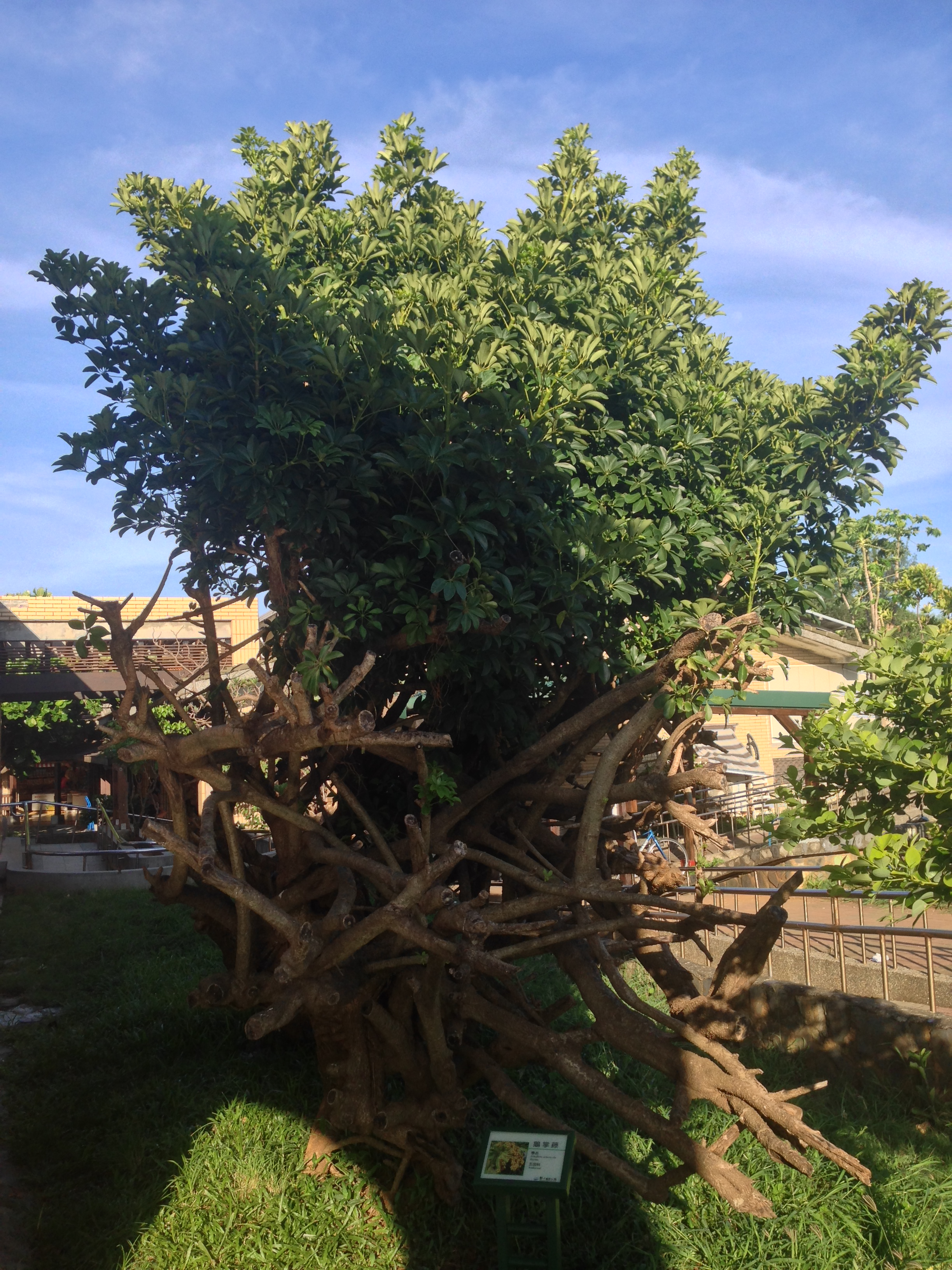 貓鼻頭公園鵝掌藤